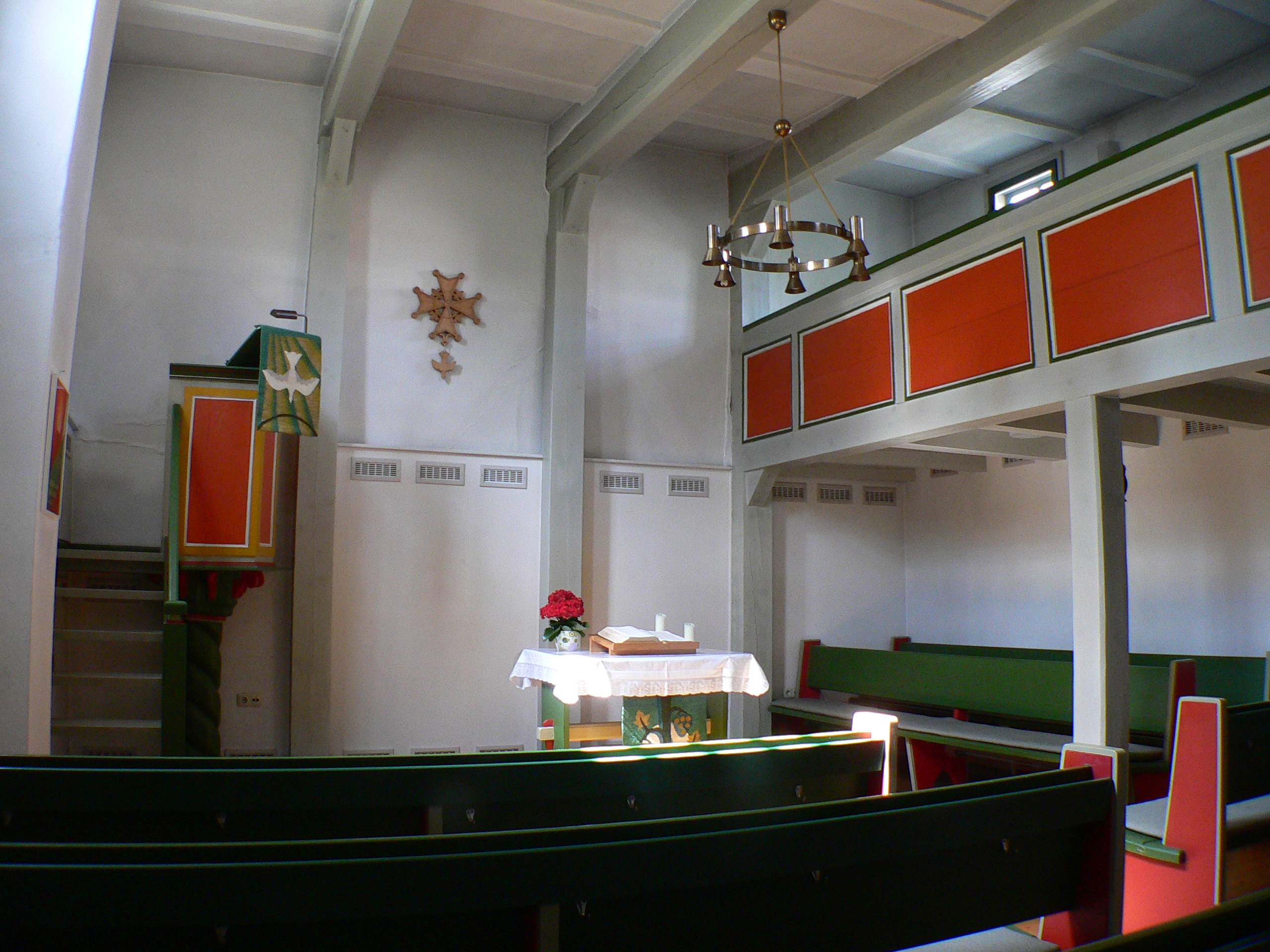 Hugenottenkirche (ev.) in Helsa (Ortsteil St. Ottilien), Hessen, Deutschland.